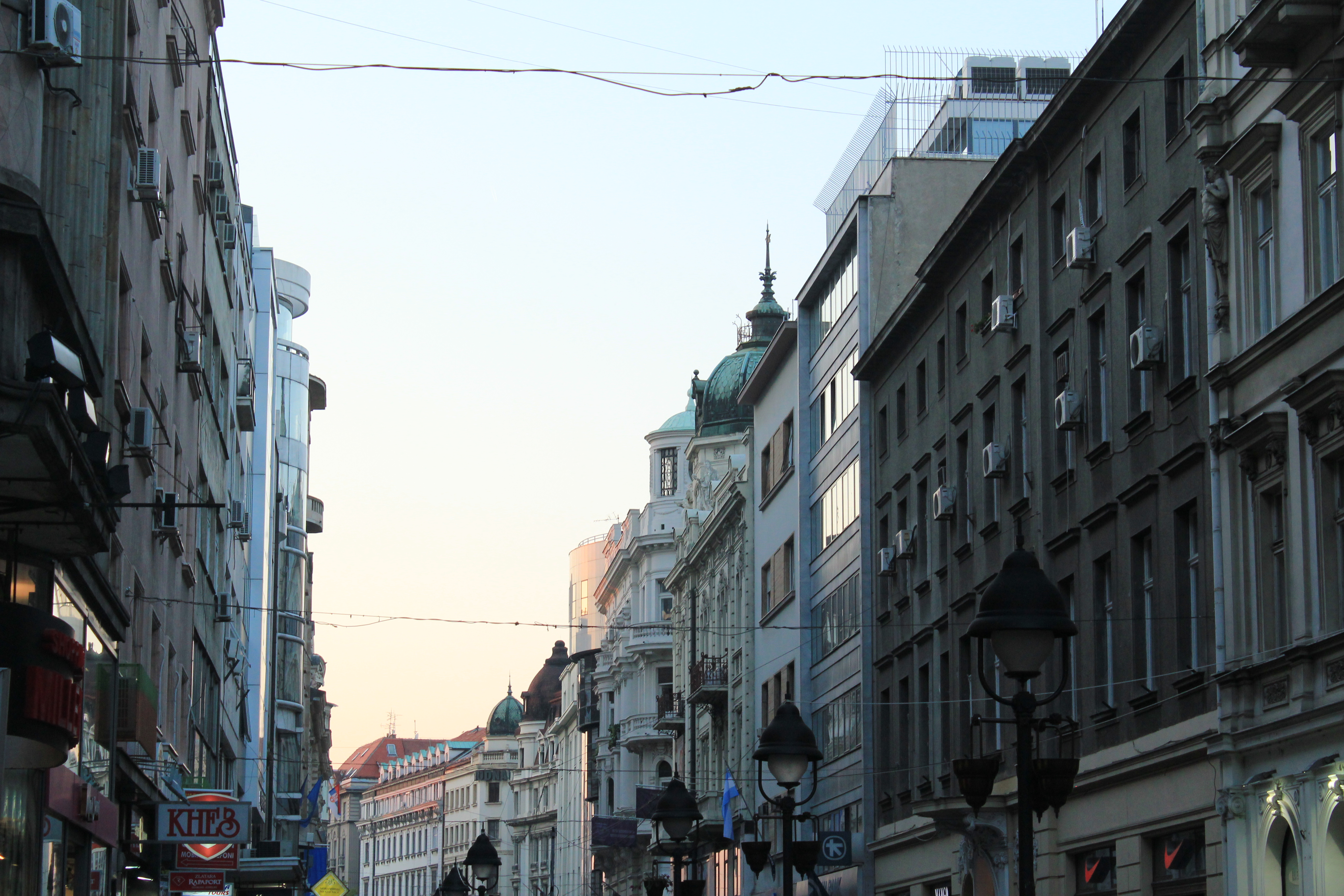 Knez Mihailova ulica, Beograd